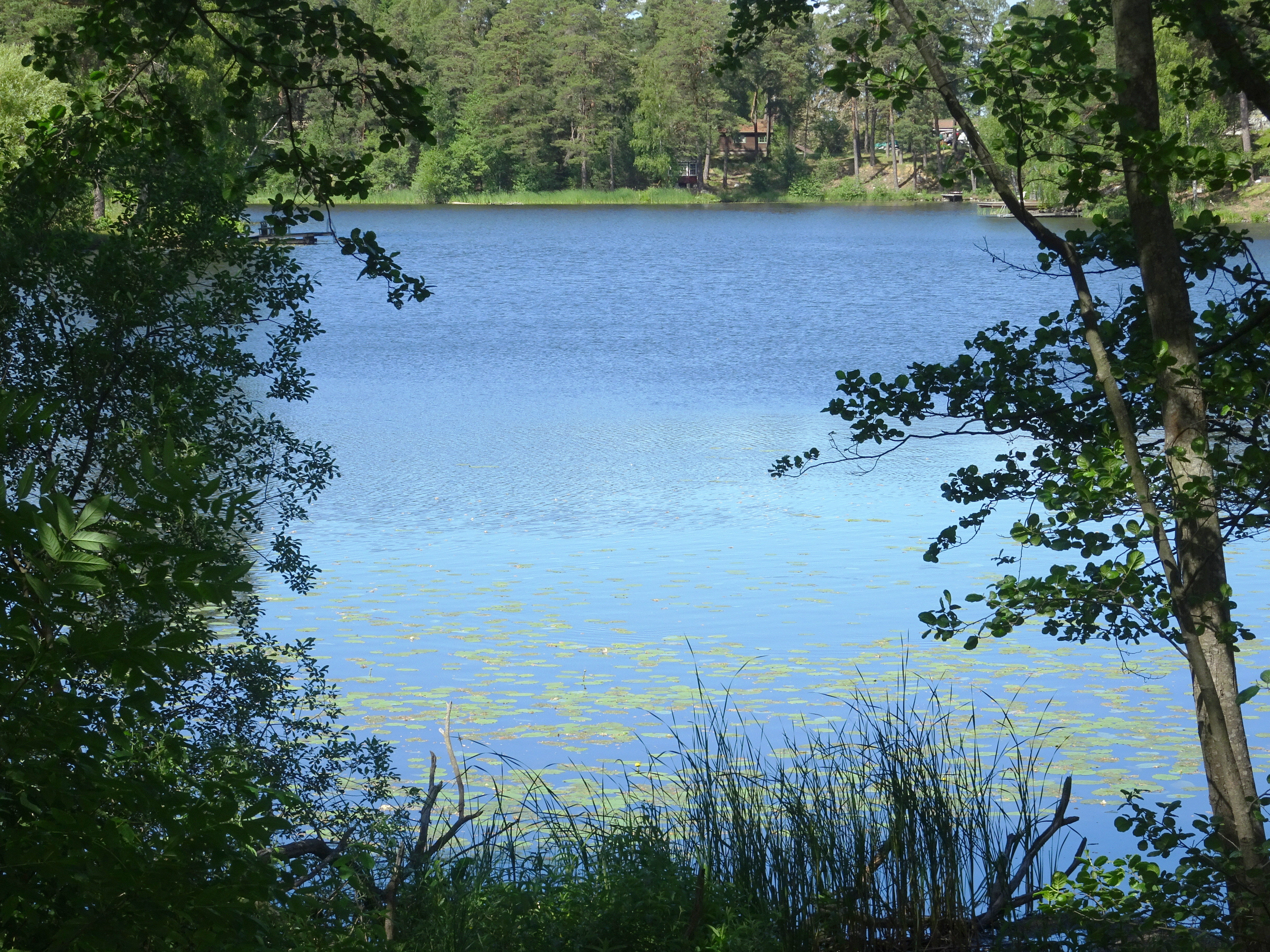 Kvarnsjön, Boo, Nacka kommun